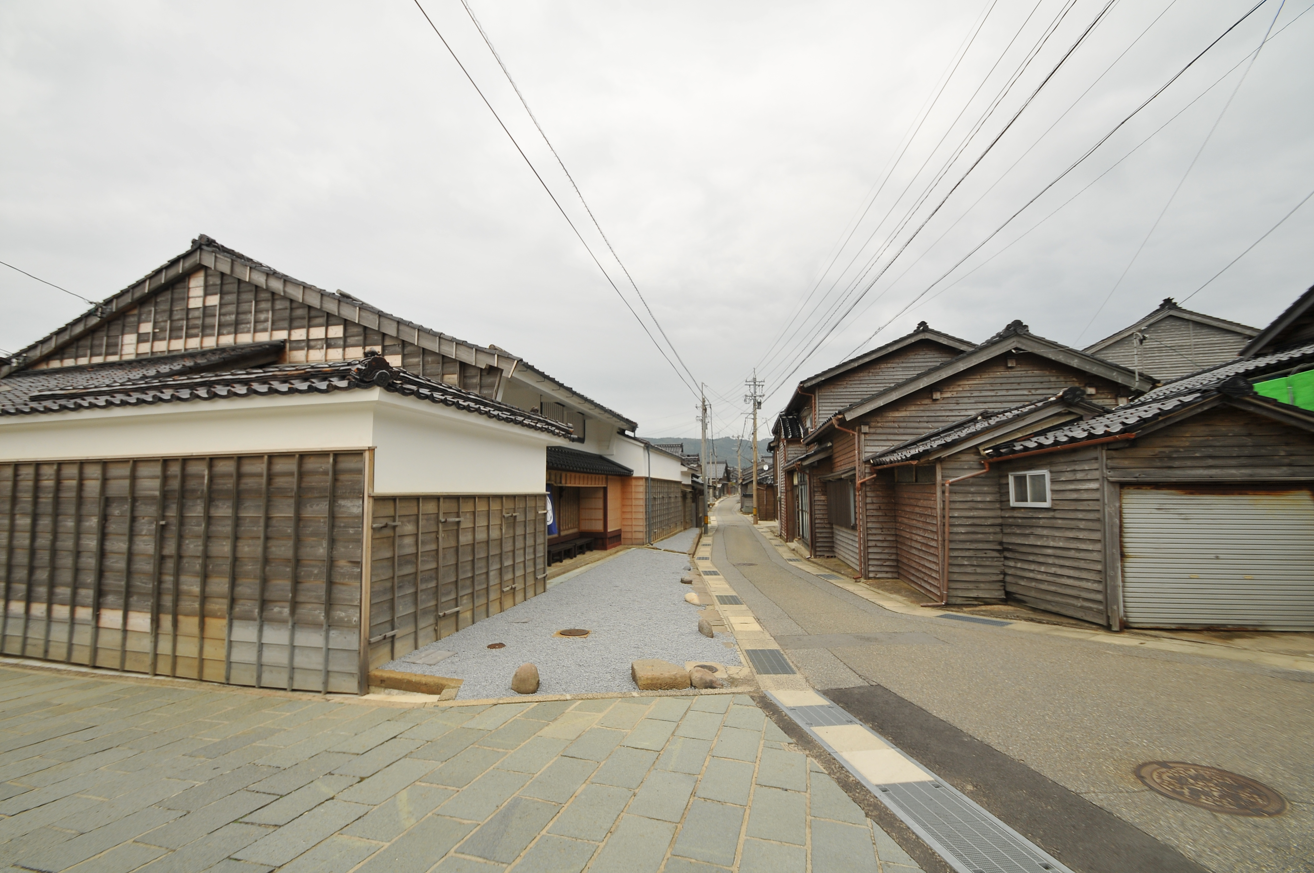 shipowner village